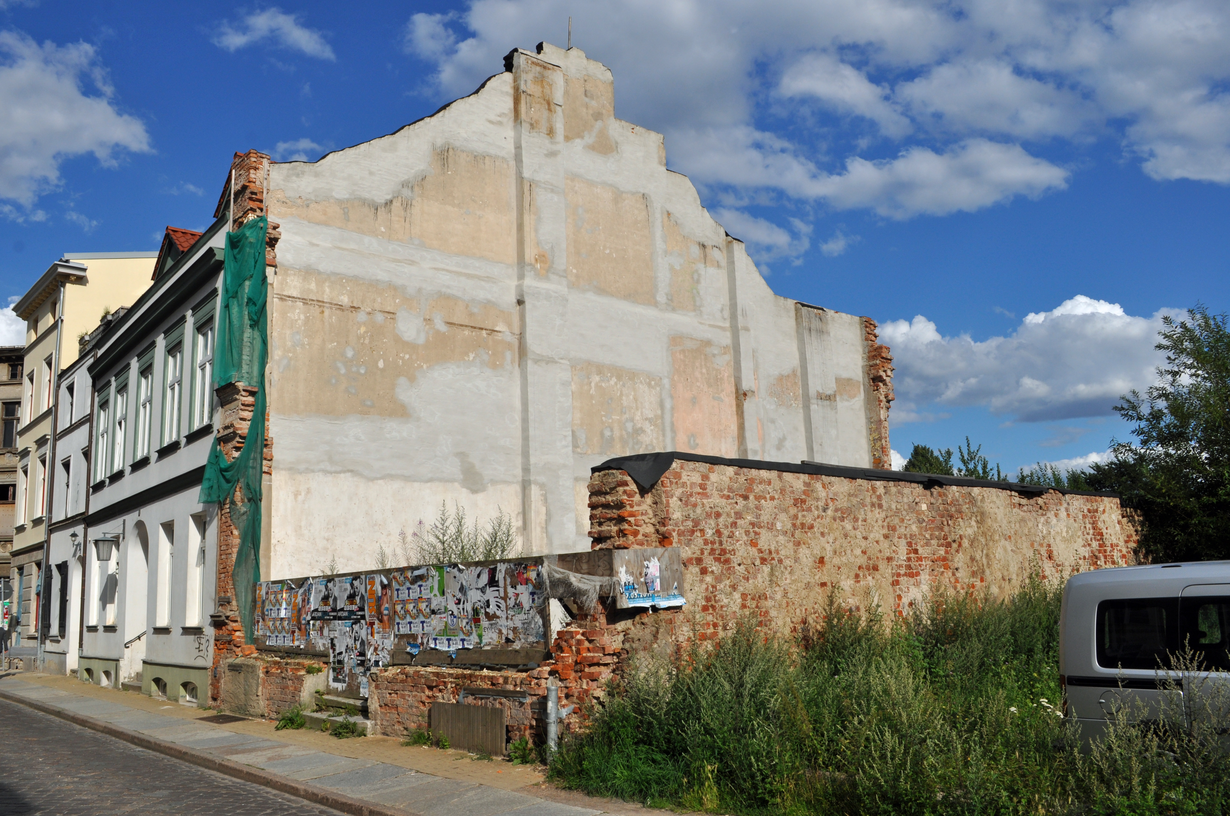 Das Foto zeigt ein Haus (bzw. Details des Hauses) in der Frankenstraße in Stralsund, Deutschland. Die Hausnummer steht im Dateinamen. Aufgenommen am 19. Juli 2011 vom Benutzer:Klugschnacker.